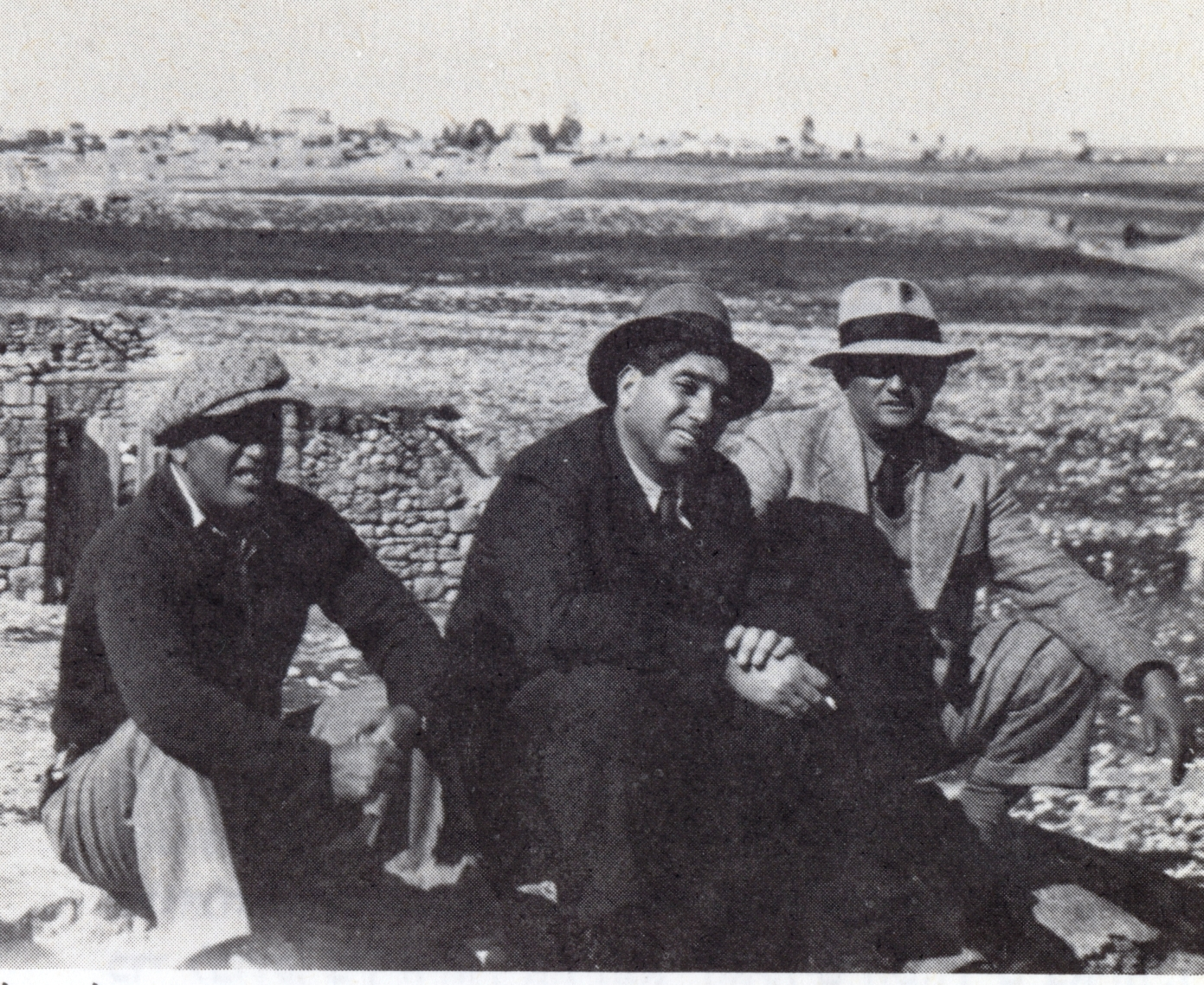 צילום משנות השלושים, בעת רכישת הקרקעות דרומית לבאר שבע. מימין לשמאל: עמינדב אלטשולר, עזרא דנין ויצחק ארנון